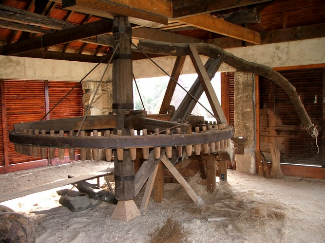 Atafona de linho pertença do espólio museológico da ADEP - Associação de estudo e Defesa do Património Histórico-Cultural de Castelo de Paiva.